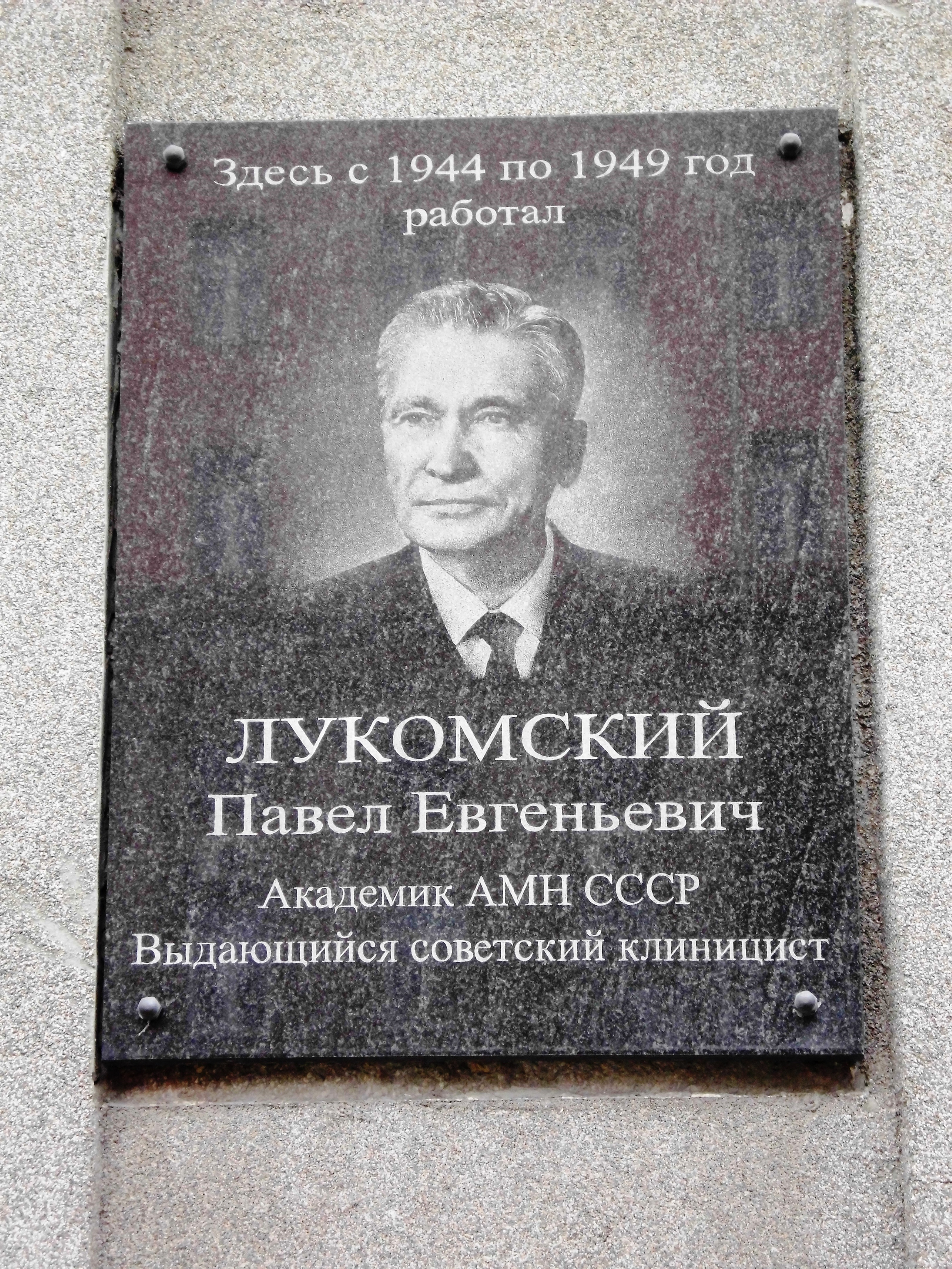 Поликлиника дорожной клинической больницы № 1 ЮУЖД на станции Челябинск. Город Челябинск, ул. Цвиллинга, 41. Памятная плитка у главного входа в поликлинику.